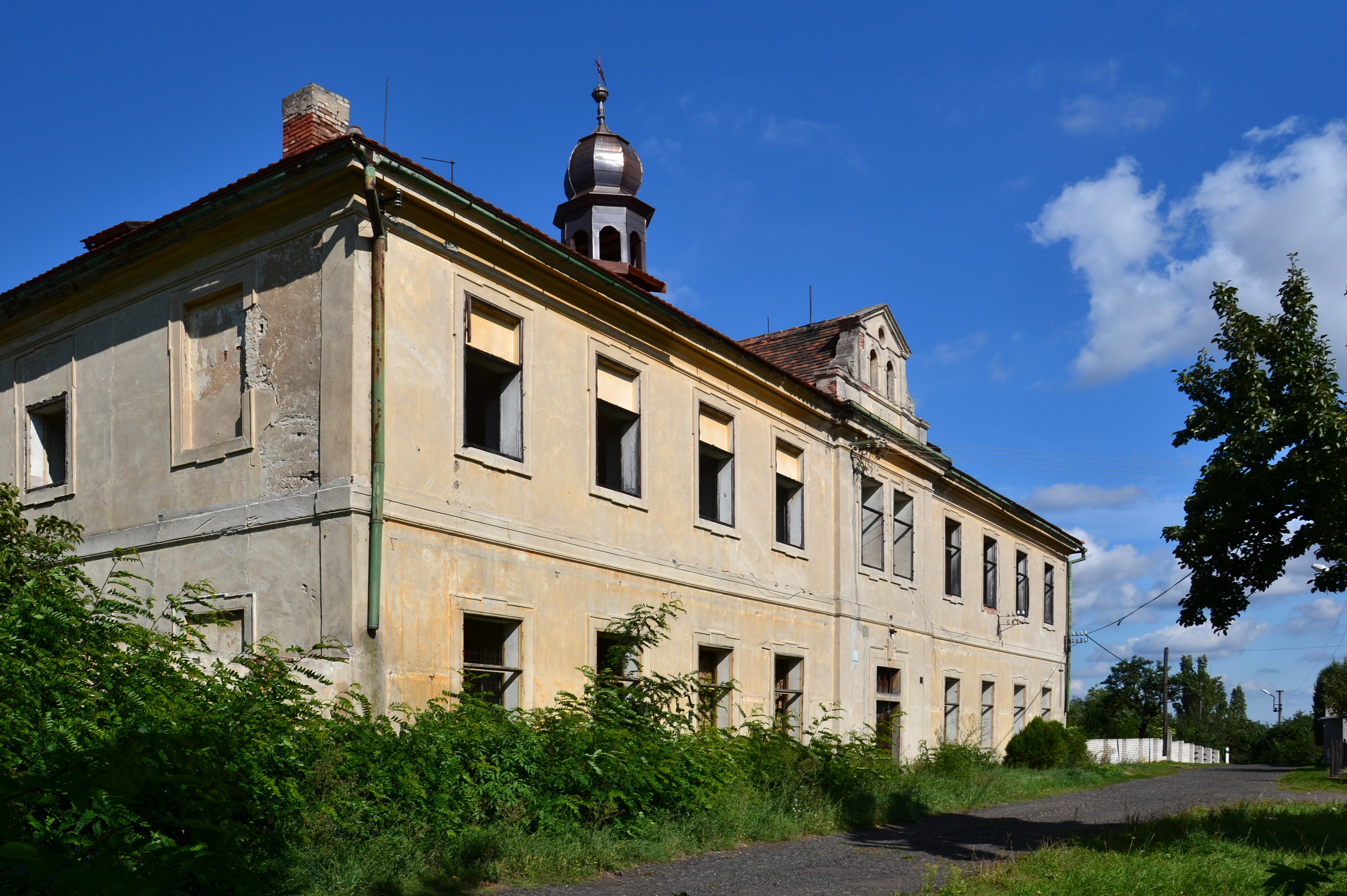 Zámek Brody, Brody 1